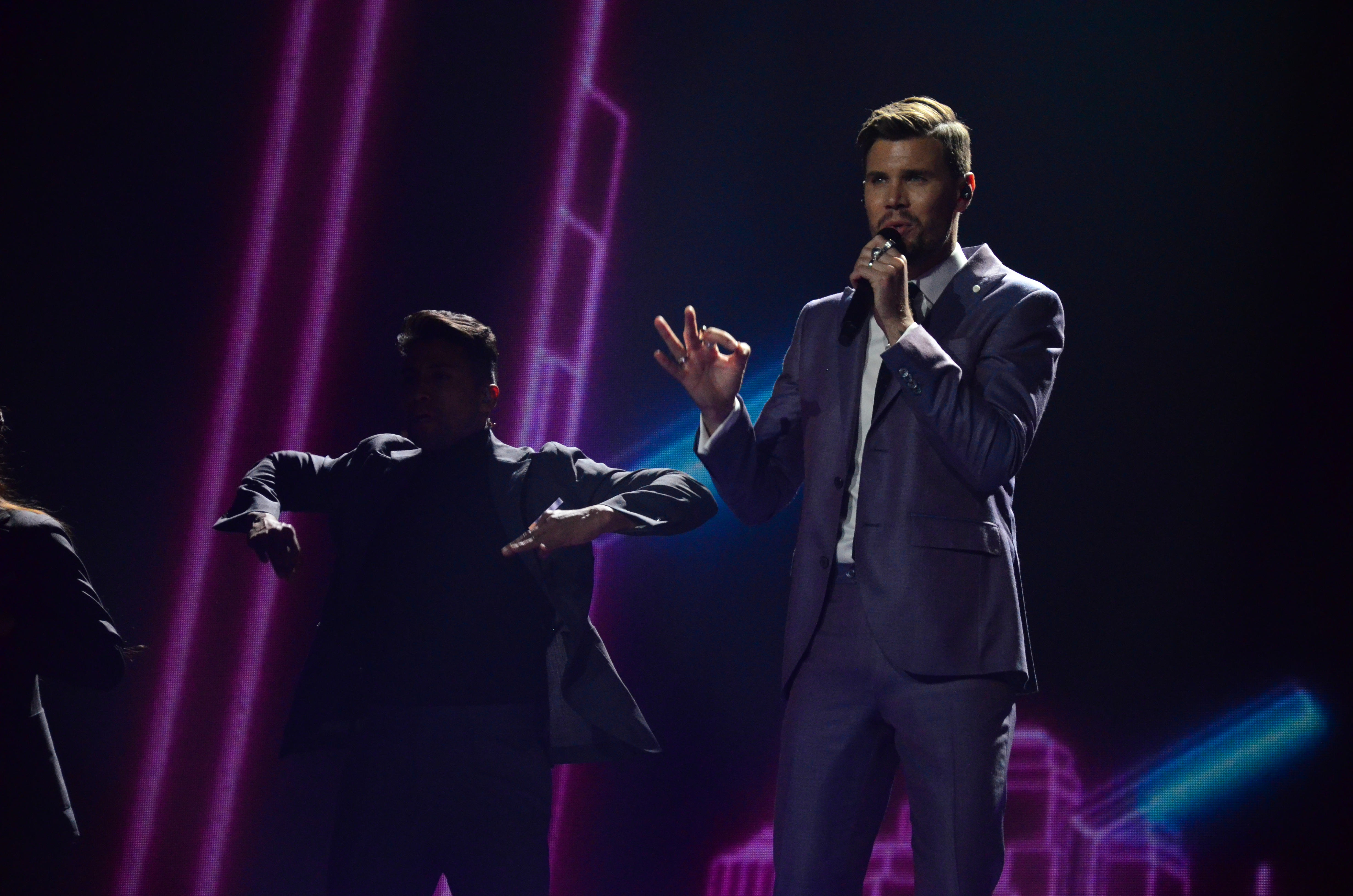 12 травня. Генеральна репетиція фіналу Євробачення 2017. Robin Bengtsson (Sweden).